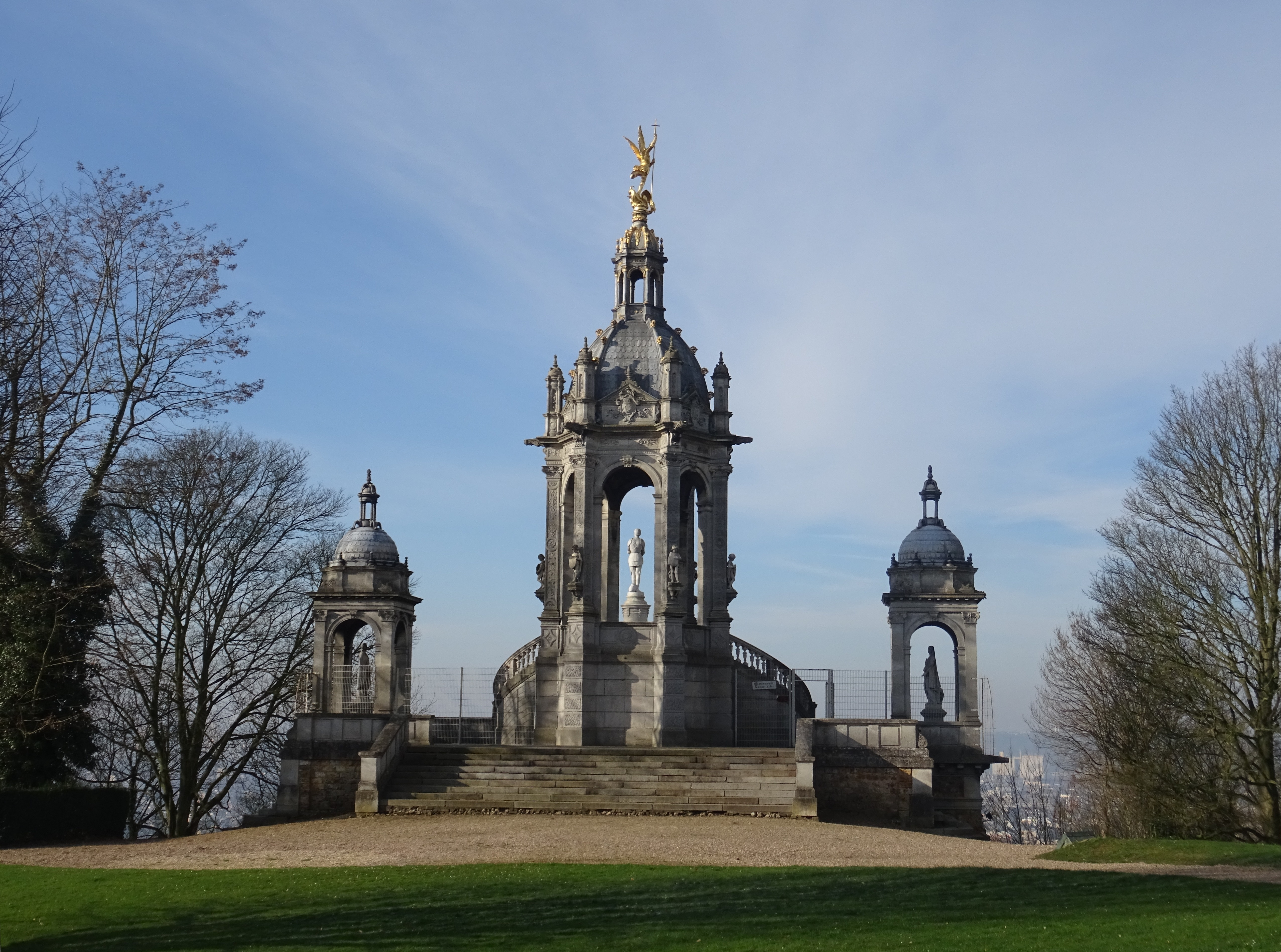 Bonsecours (Seine-Maritime, France) - Monument à Jeanne d'Arc